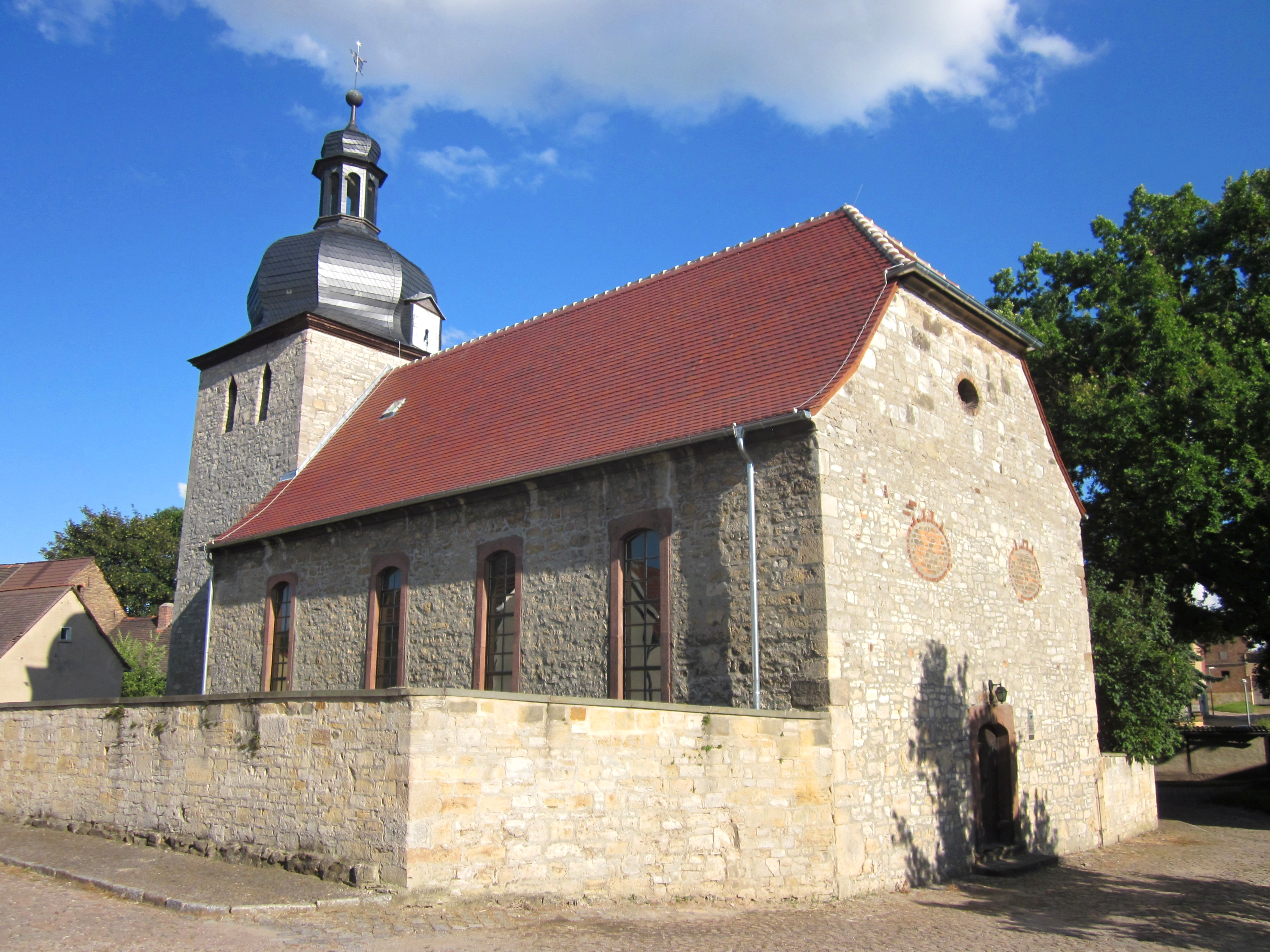 Dorfkirche Schmirma